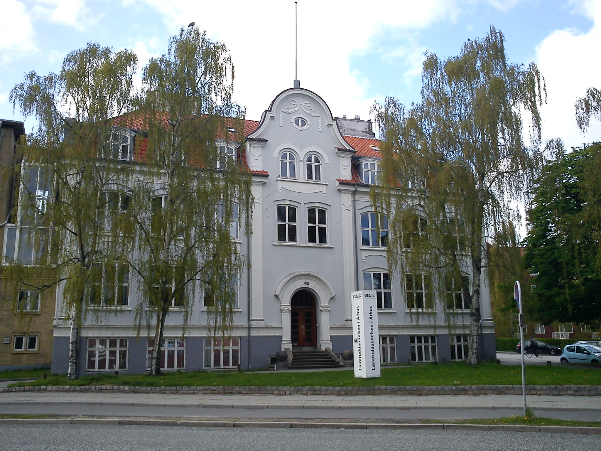 VIA University College i Aarhus. Hovedkontoret for Læreruddannelsen i Aarhus.